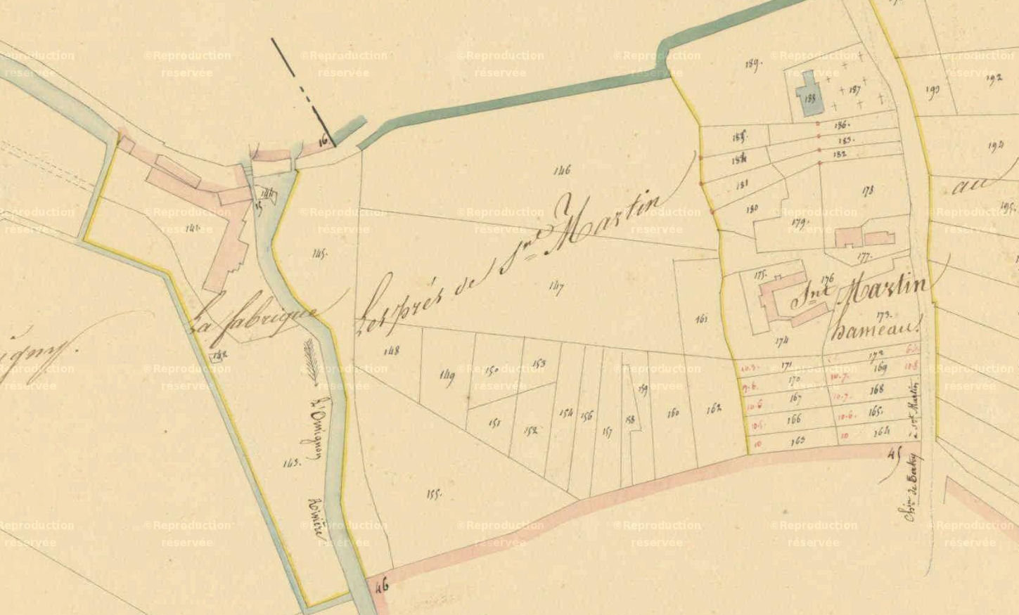 Cadastre du village disparu de St-martin-des-Prés